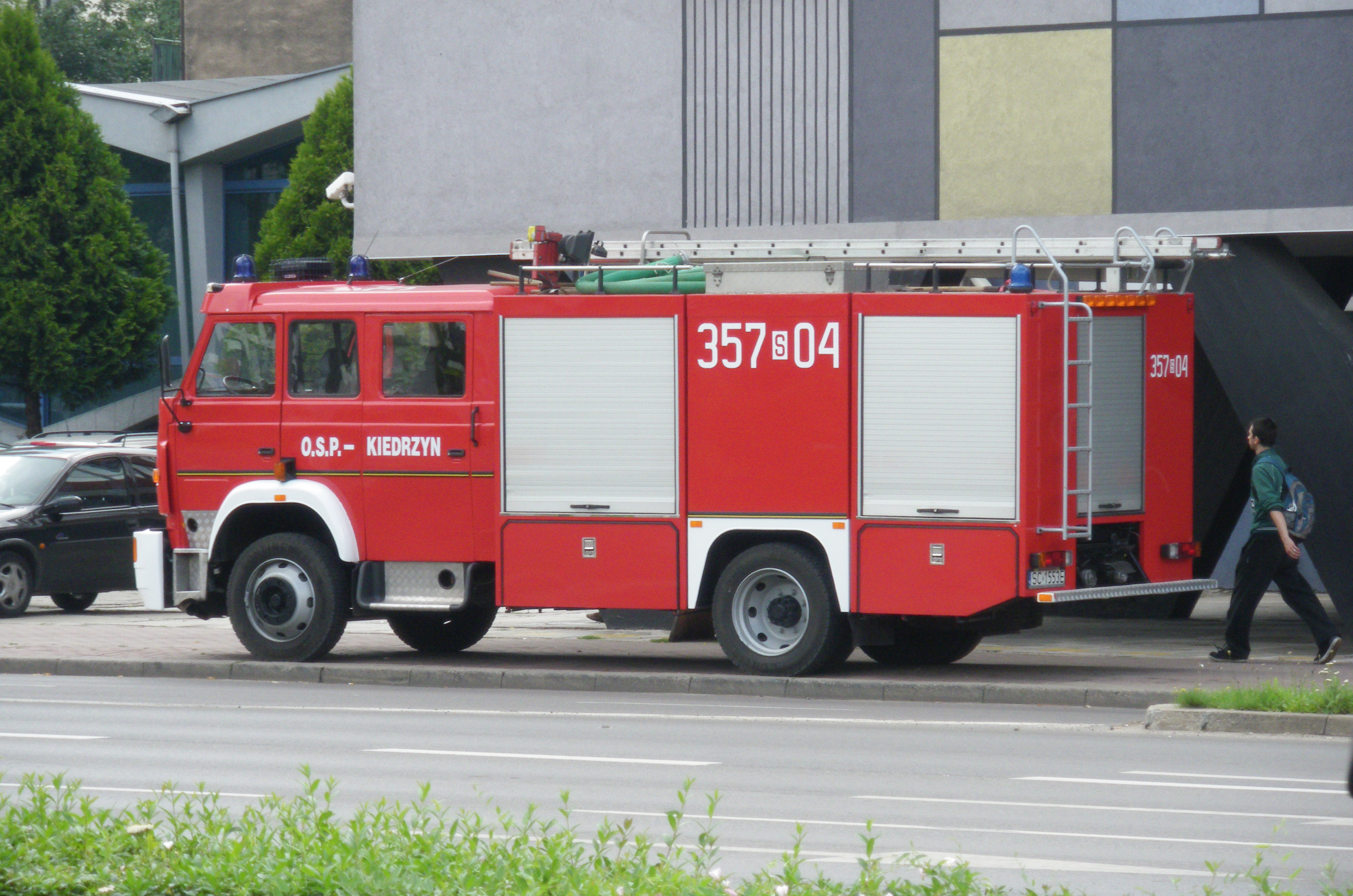 GBA 2/24 Star 1142/SHL/Bocar. Jednostka wysłana do zabezpieczenia trasy Tour de Pologne 2011 w Częstochowie.